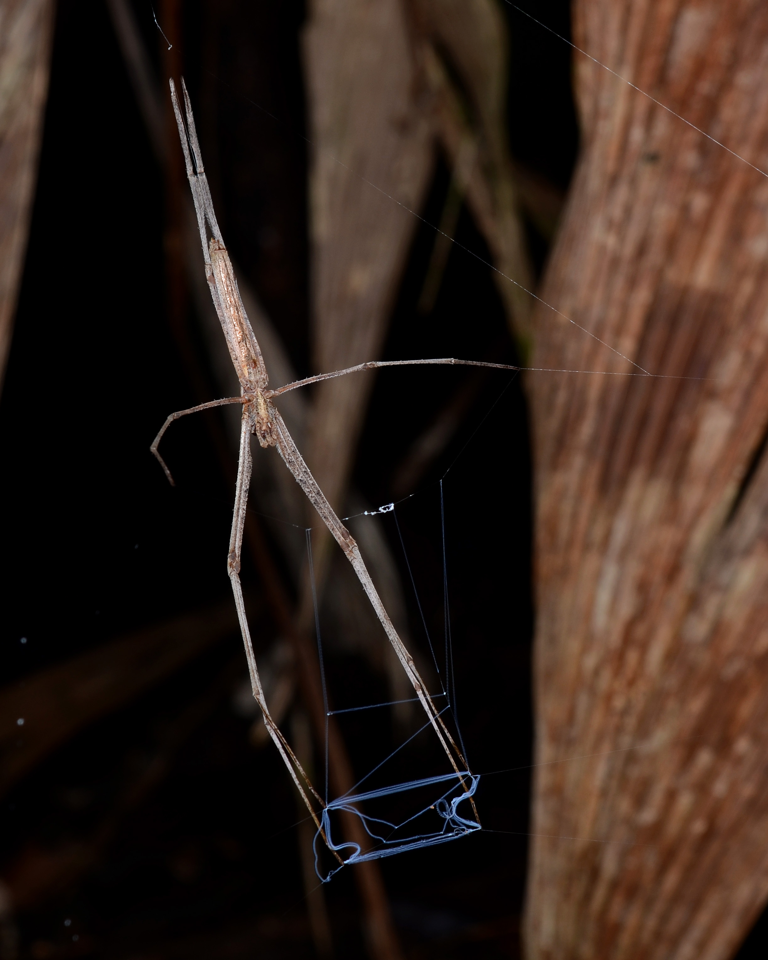 Deinopidae: Deinopis sp.